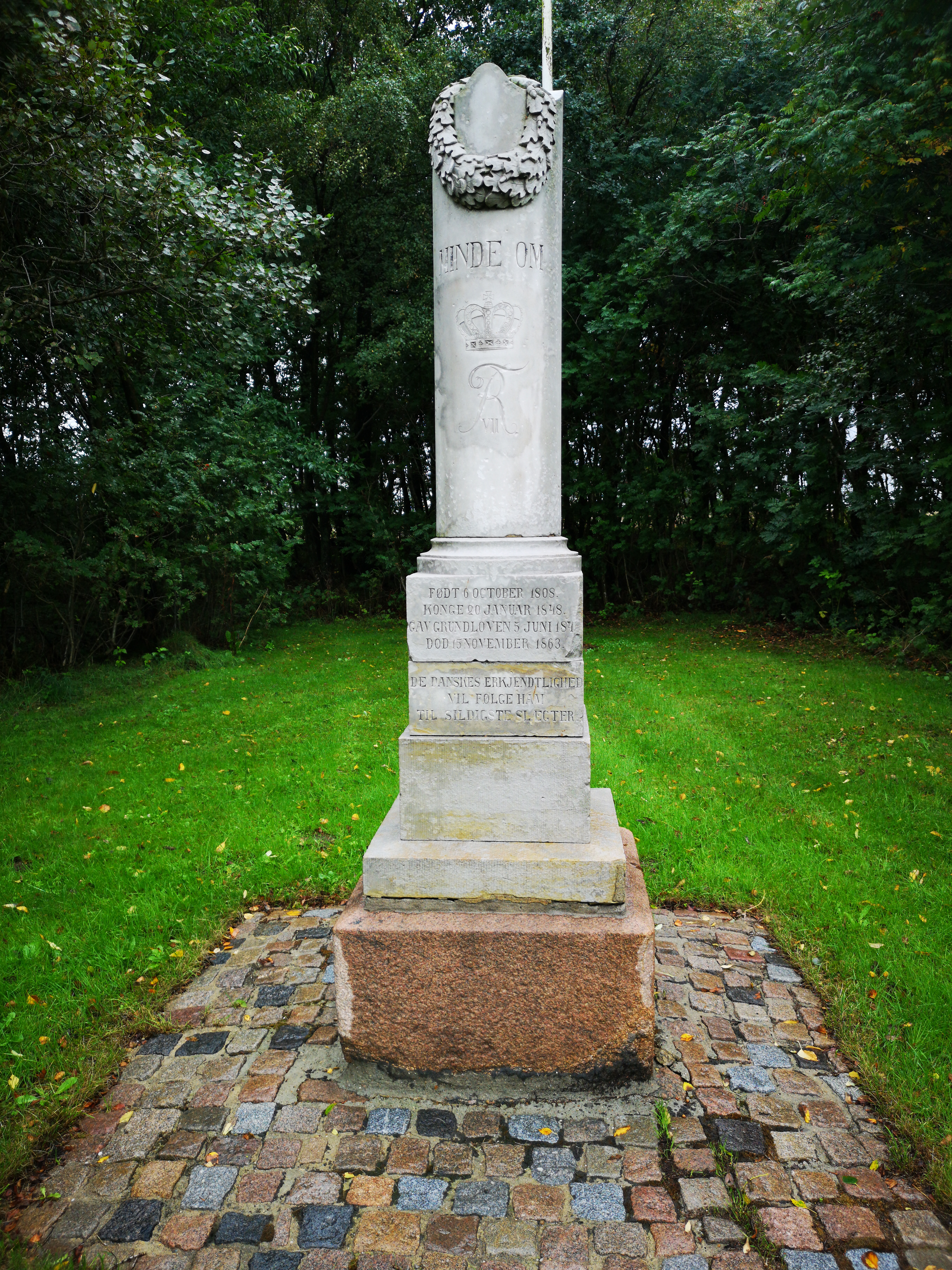 Mindesten ved Ringkøbingvej-Brejningvej krydset